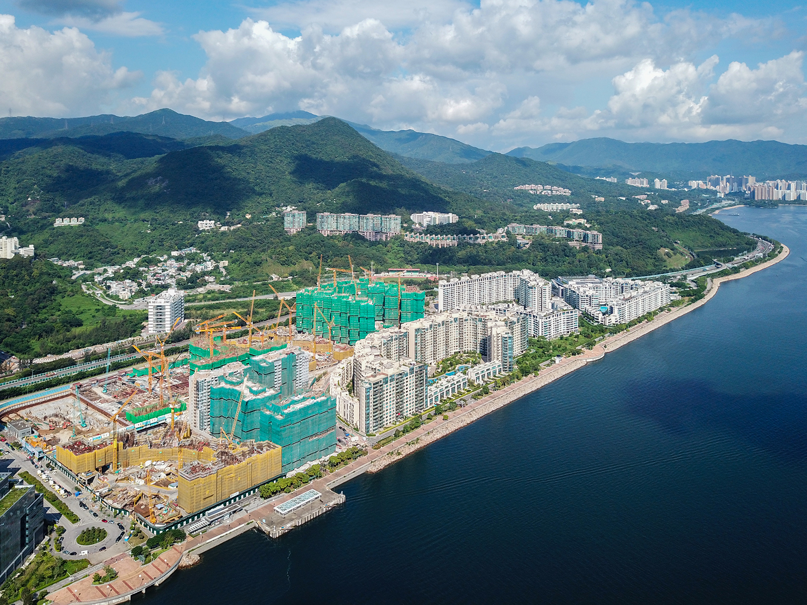 Pak Shek Kok